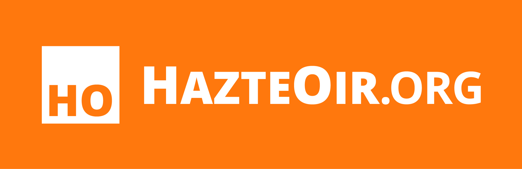 Logo de